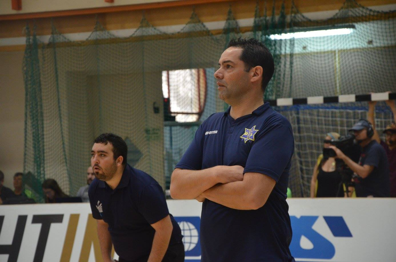 זוהר בר נצר, מאמן מכבי תל אביב בכדורעף